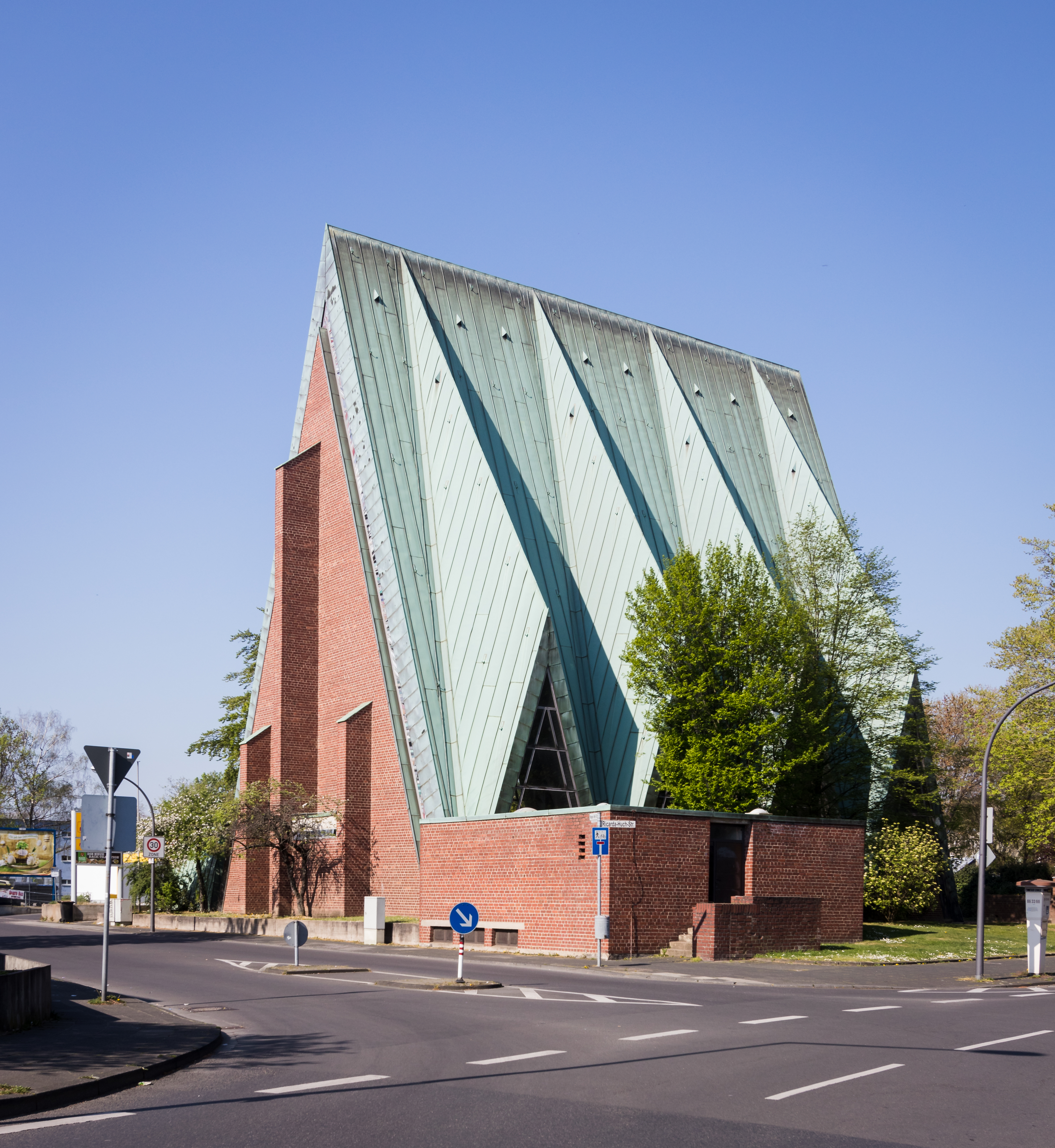 St. Johannes der Evangelist (Köln-Stammheim), Architekt: Karl und Gero Band; seit 2018 zur Profanierung und Abriss vorgesehen.